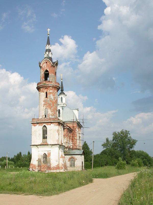 Неоготическая церковь Архангела Михаила в деревне Поджигородово, Клинский район Московской области